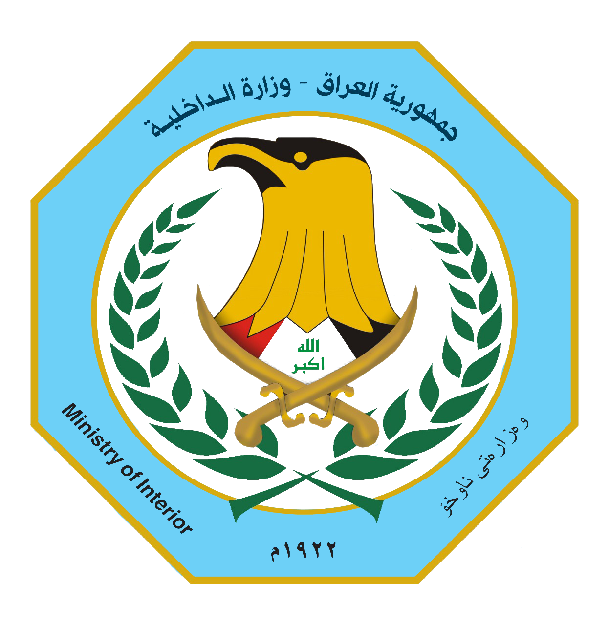 هذا شعار وزارة الداخلية العراقية الجديد